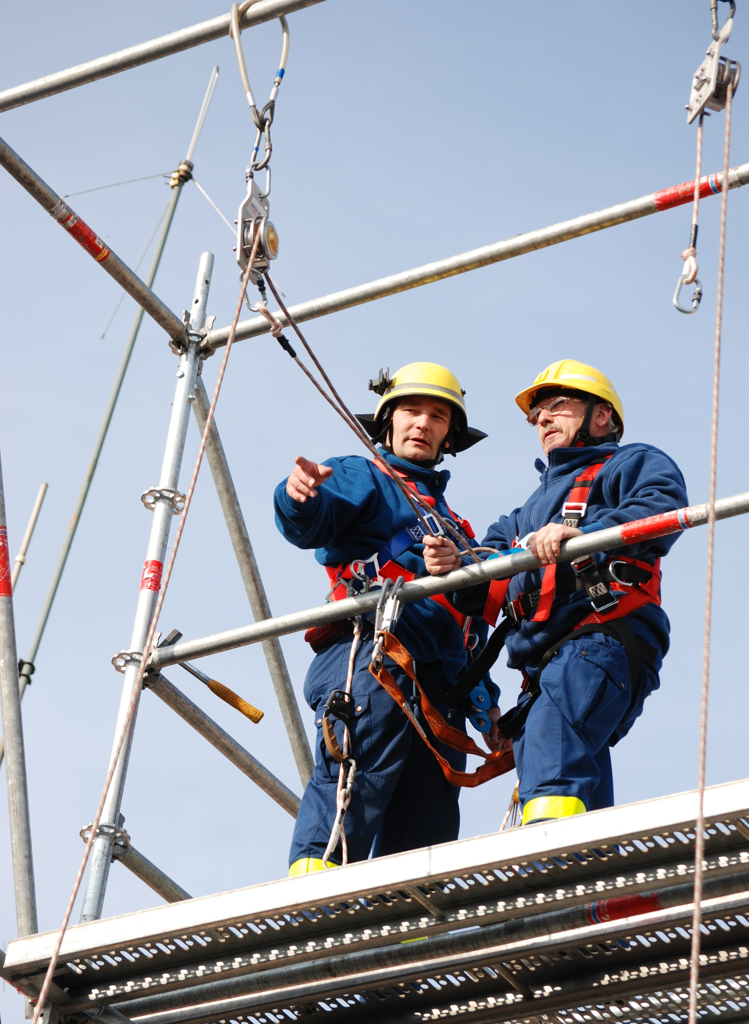 Rollgliss Sicherungssystem auf THW EGS Turm (Layer)